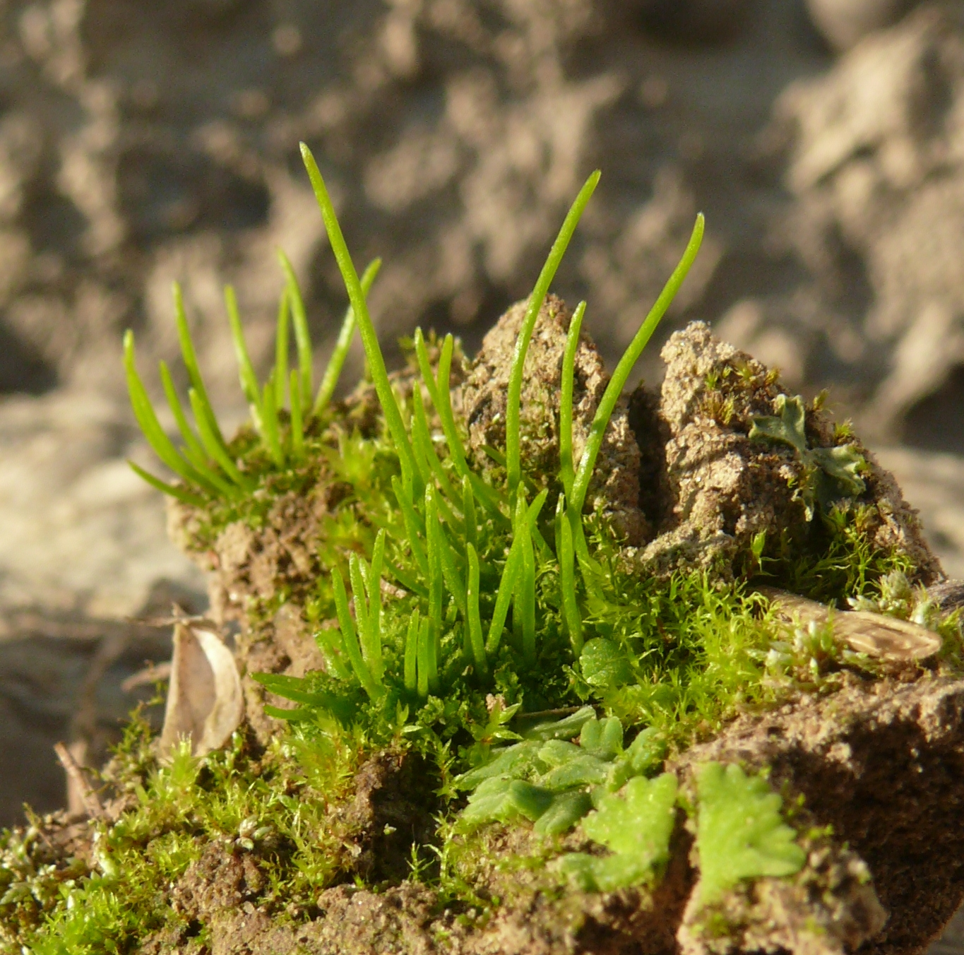 Anthoceros agrestis, Schwäbisch-Fränkische Waldberge, Deutschland